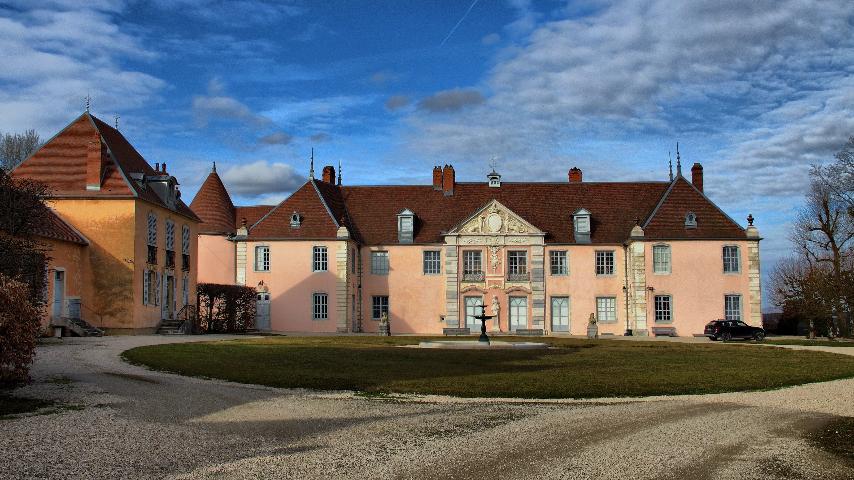 Château de Torpes (InscritClassé) .